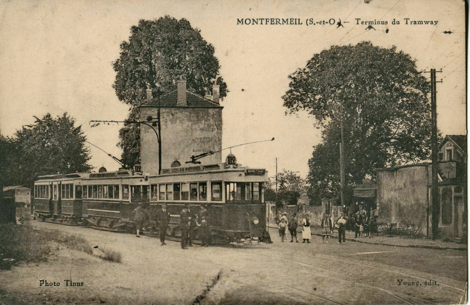 Carte postale ancienne éditée par Young (photo Tinus) : MONTFERMEIL - Terminus du Tramway